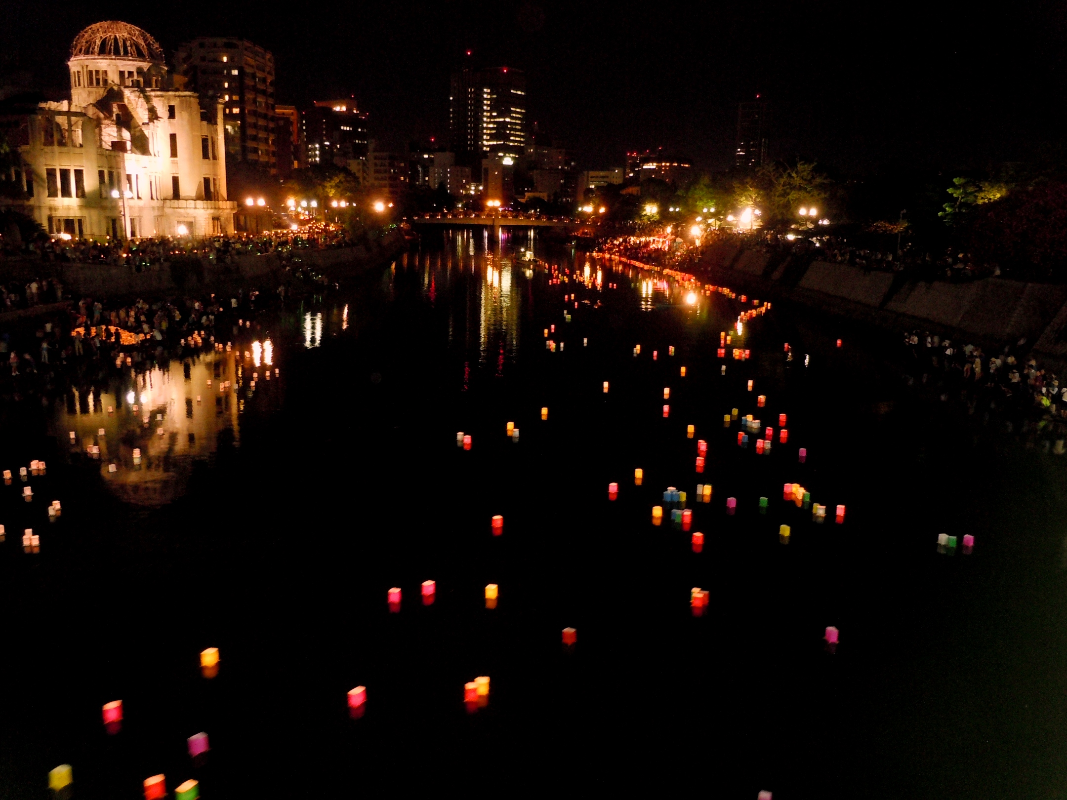 8月6日とうろう流し。